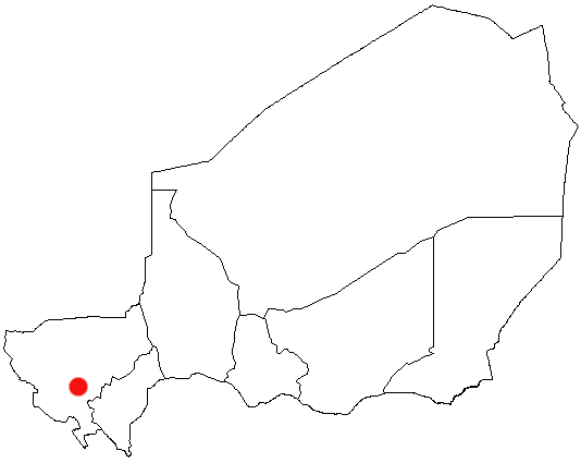 Местоположение на картата на Нигер.